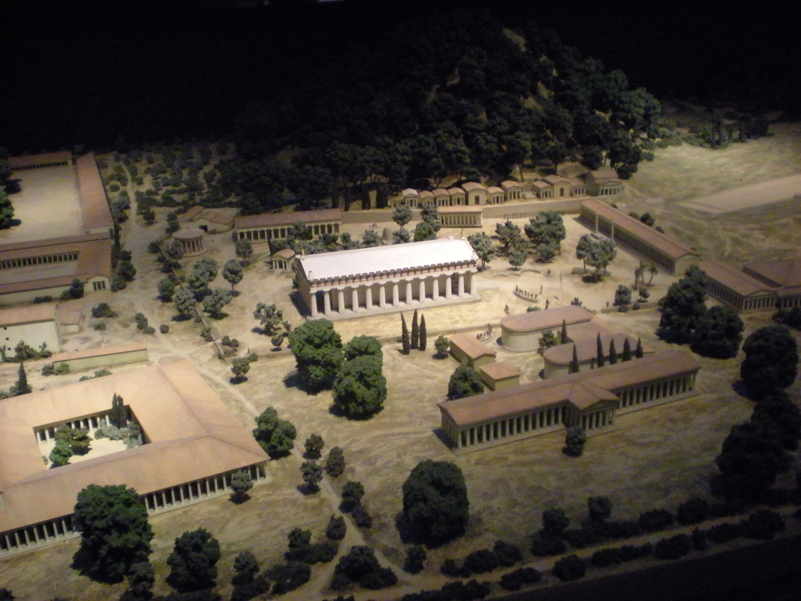 Maqueta arquitectónica del recinto del santuario de Olimpia, en Grecia. Pertenece a la exposición La belleza del cuerpo, en el MARQ. Forma parte de la exposición permanente del Museo Británico